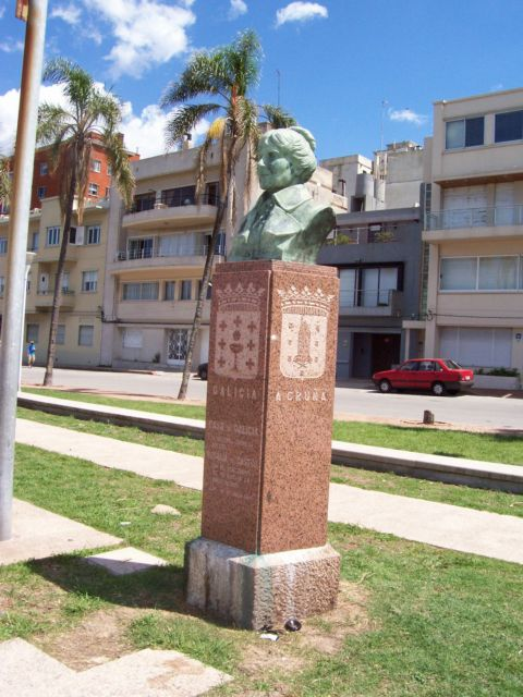 Monumento a Rosalía de Castro en la Plaza Galicia, en la rambla de la ciudad de Montevideo, Uruguay. Tomada por Federico Corral aka Shant